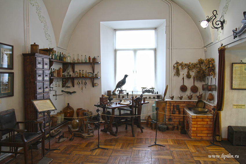 Гродна. Музей-аптэка